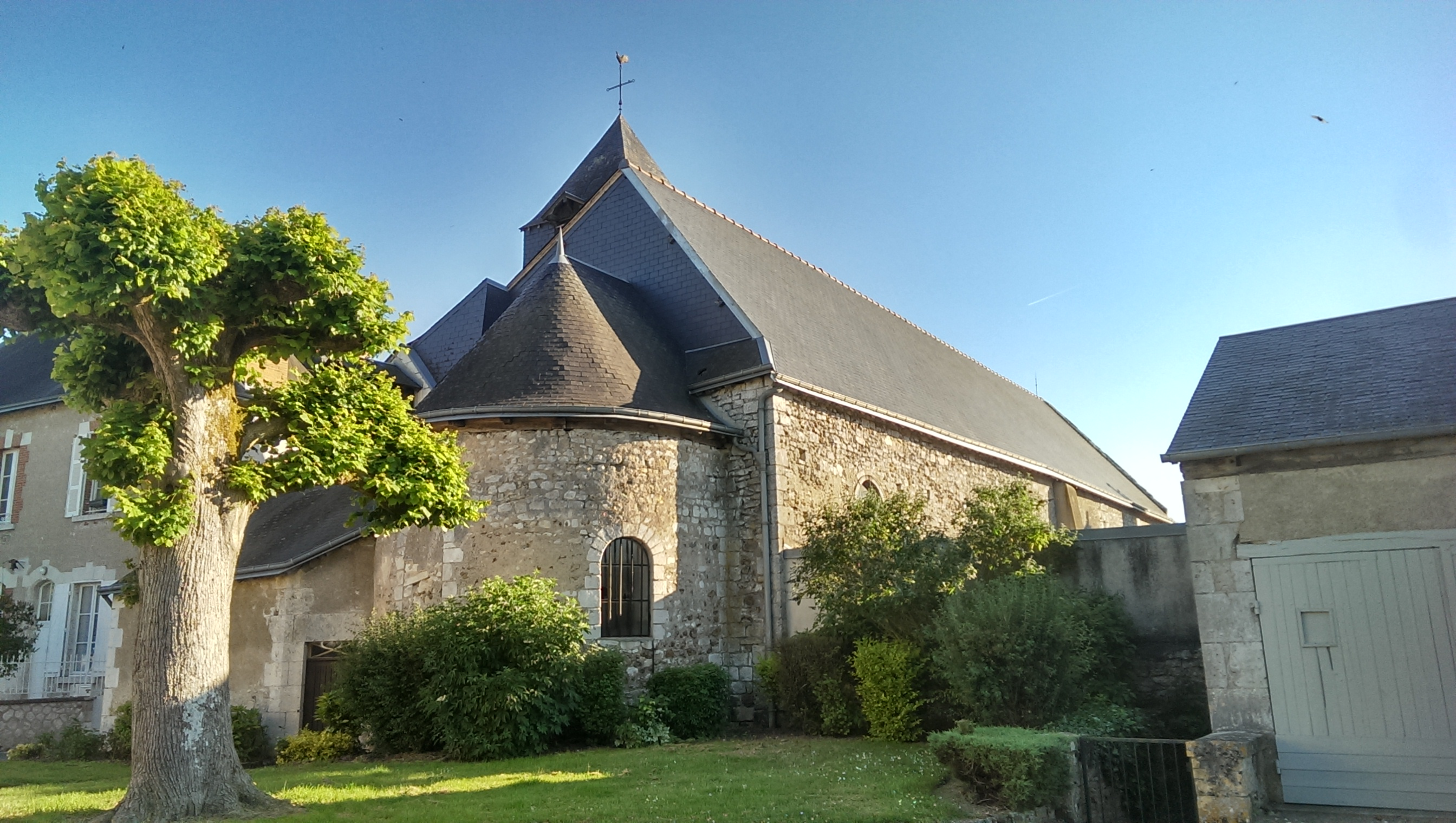 L'église Saint-Julien de Chambon-sur-Cisse, dans le Loir-et-Cher. Photo prise avec le mode HDR du HTC One.